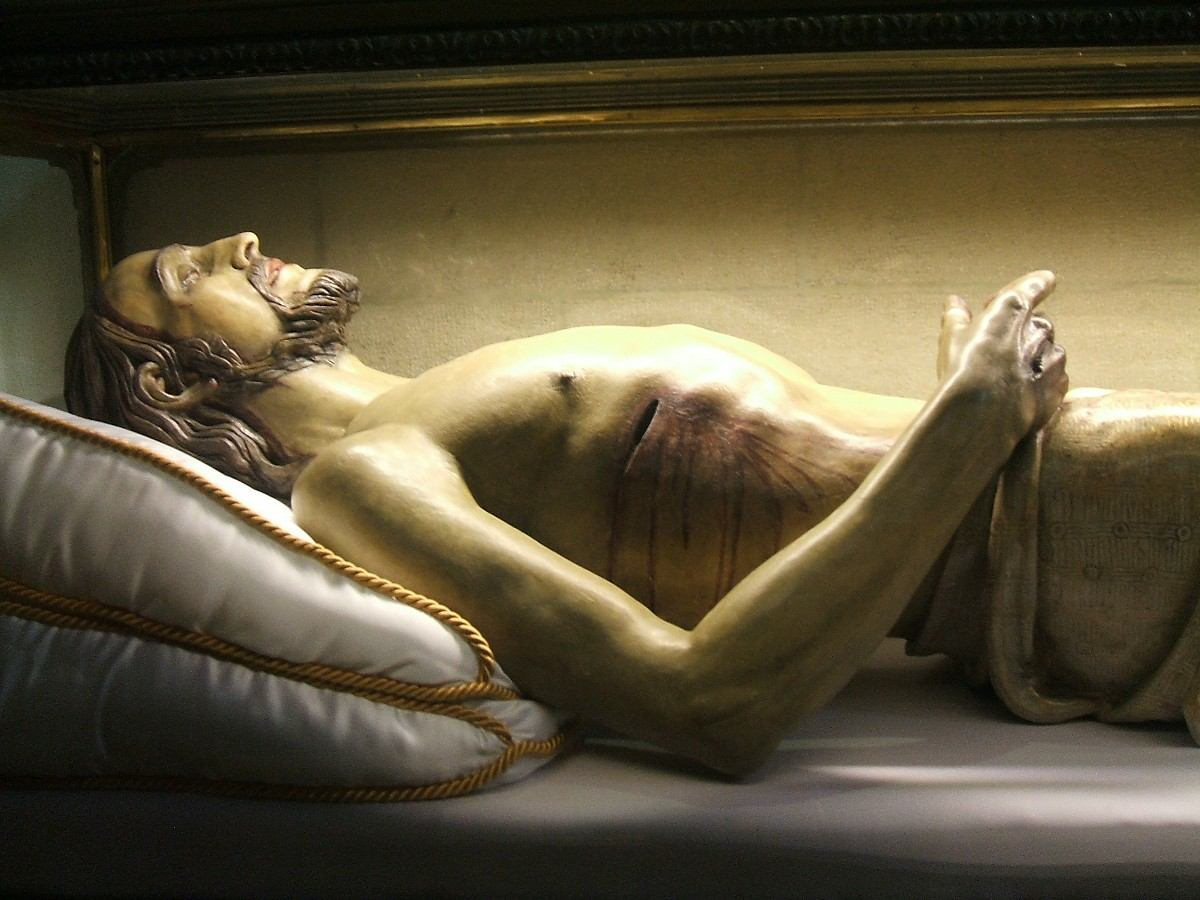 Cristo yacente, obra de Quintín de Torre, en la Capilla de los Zumelzu de la Parroquia de San Vicente Mártir de Abando, Bilbao, País Vasco, España/Spain